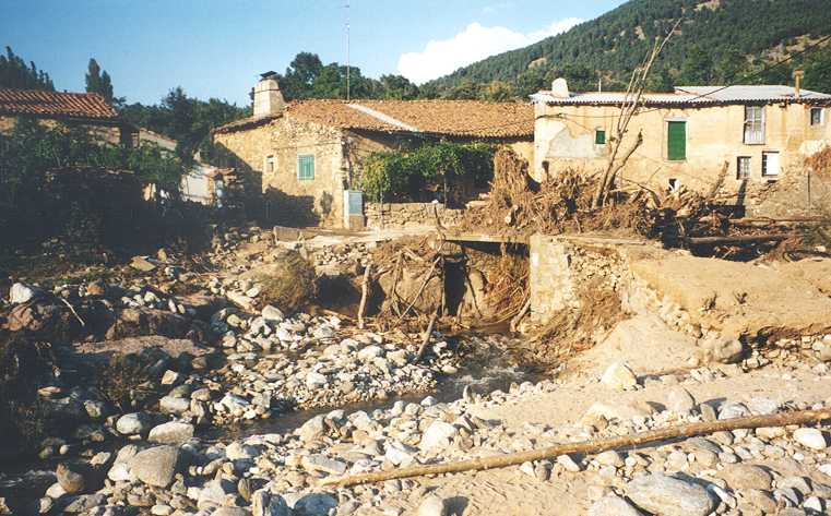 Anejo de La Ribera tras la riada del 1 de septiembre de 1999. Villafranca de la Sierra (Ávila, España). Autor: C3PO